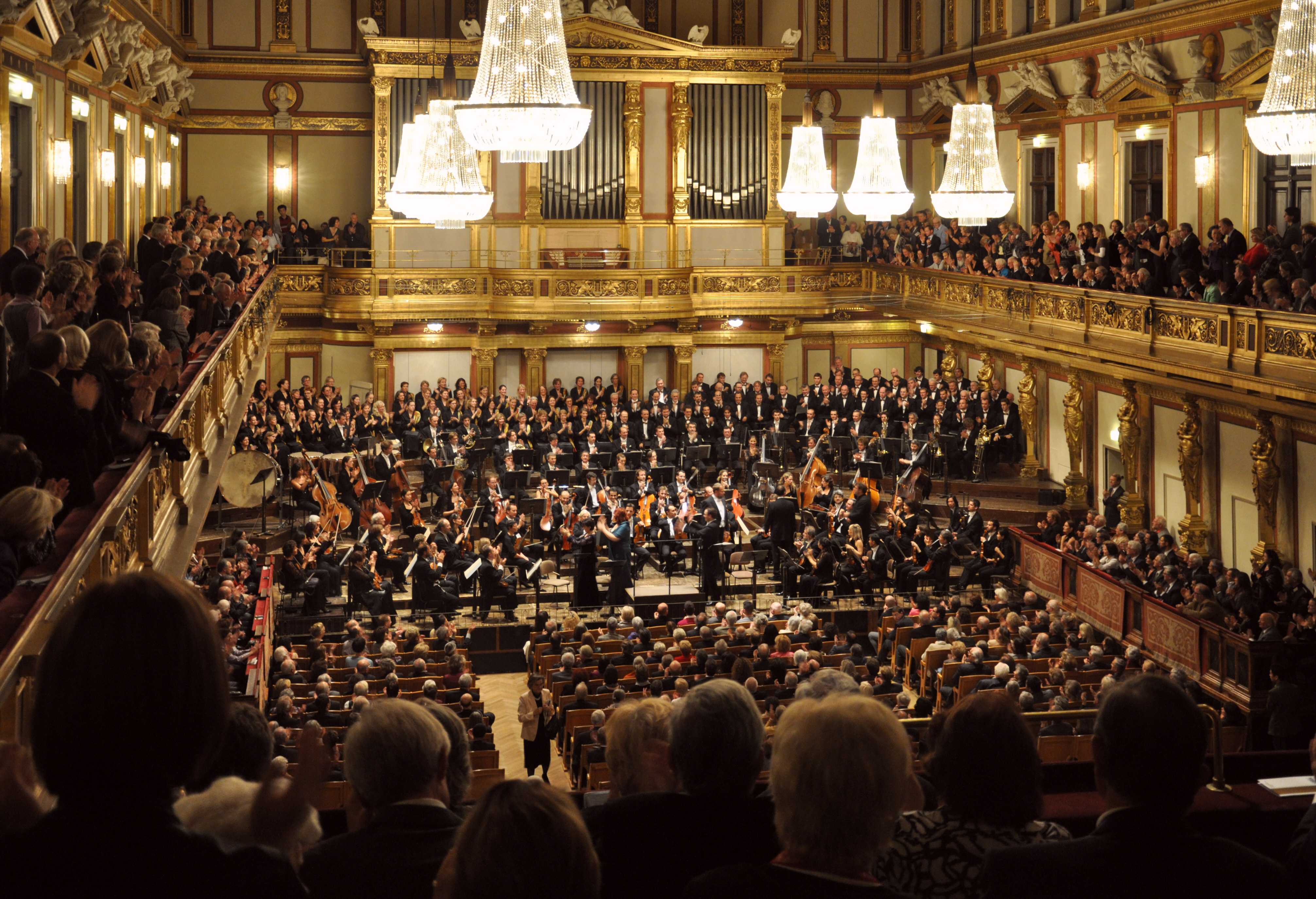 Wien, Musikverein, Goldener Saal